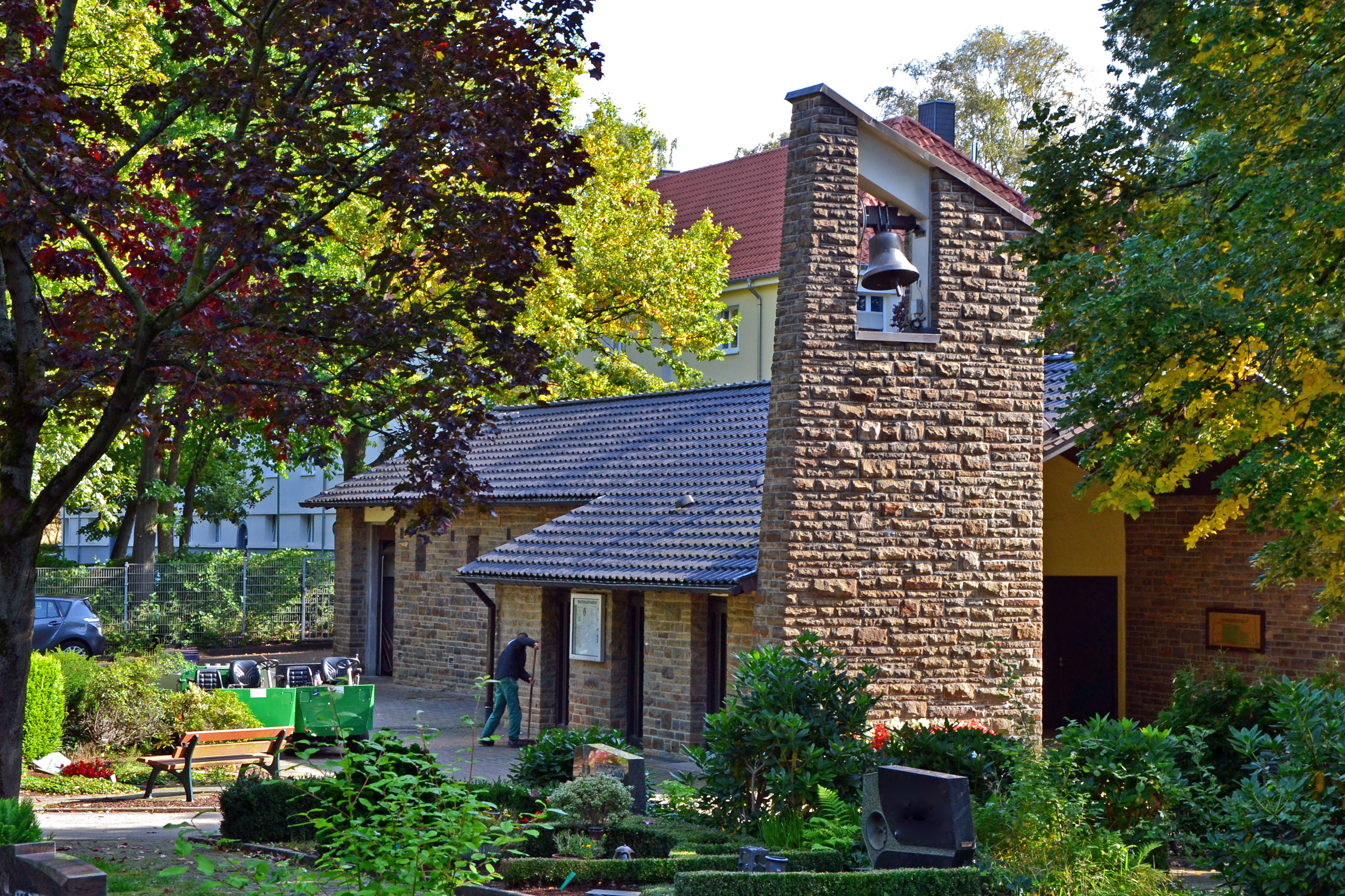 Matthäusfriedhof Essen, Kapelle